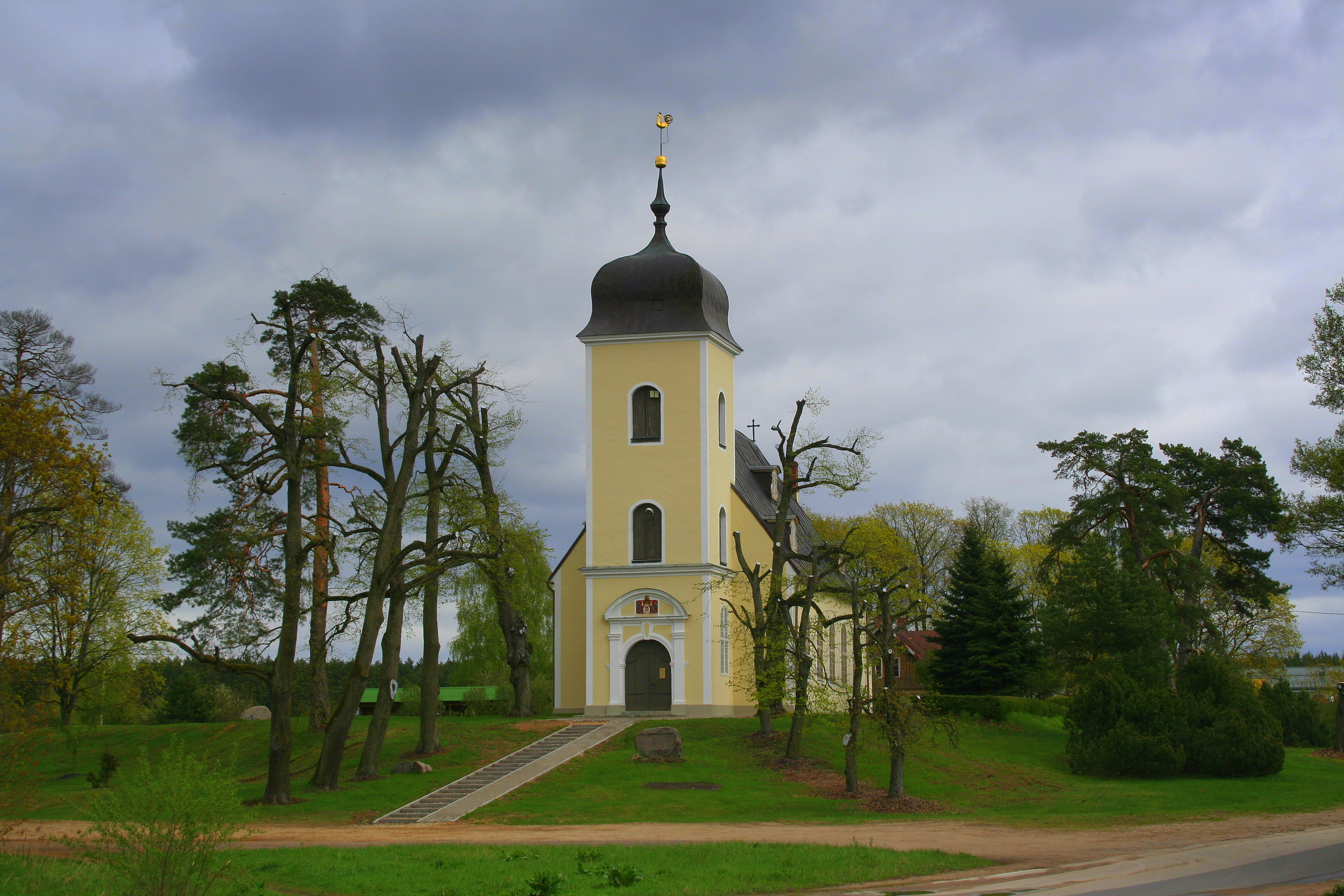 Biķeru luterāņu baznīca, Rīga, Biķernieku iela 140